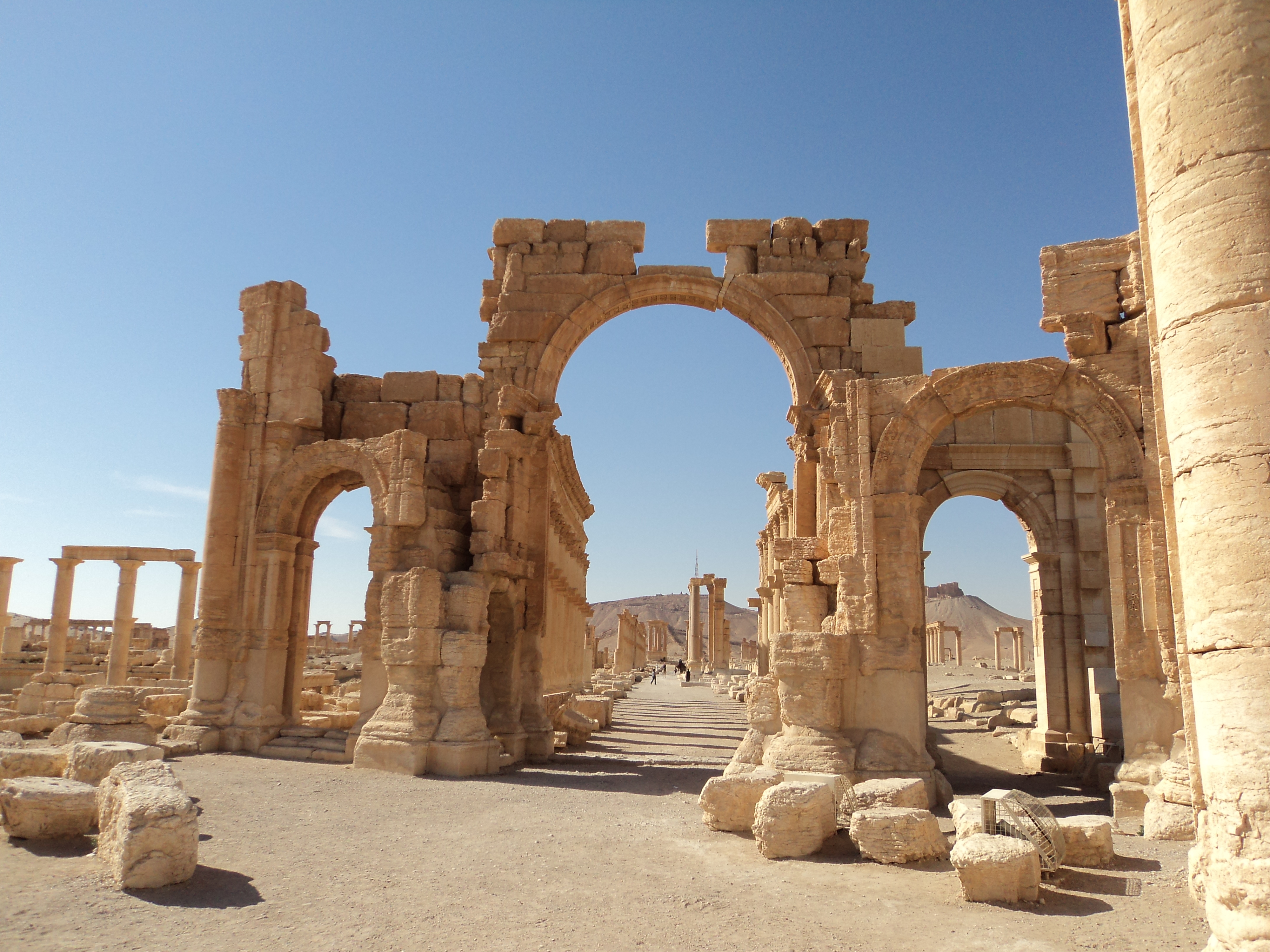 Palmyra-Tadmor